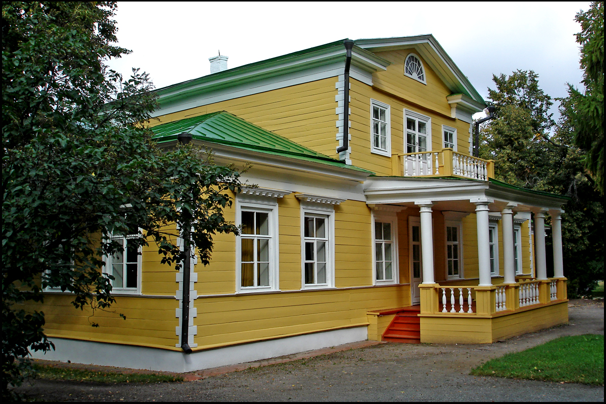 Большое Болдино